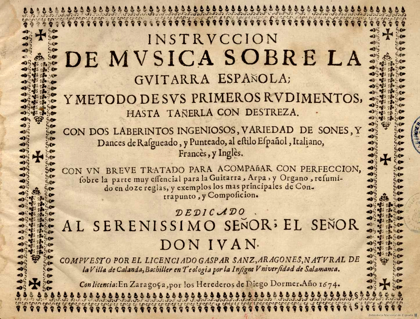 Gaspar Sanz, Instrucción de música sobre la guitarra española y método de sus primeros rudimentos, hasta tañerla con destreza. Con dos laberintos ingeniosos, variedad de sones, y dances de rasgueado y punteado, al estilo español, italiano, francés e inglés, Zaragoza, Herederos de Diego Dormer, 1674.